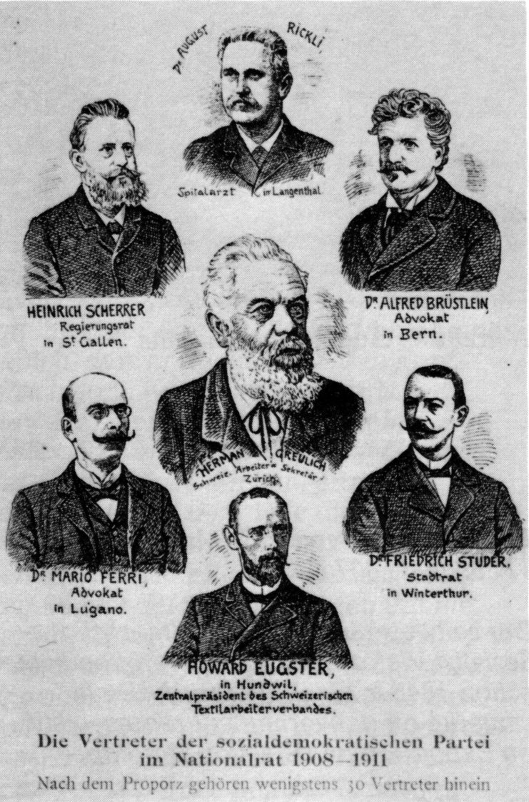 Darstellung der sogenannten «Kapelle Greulich», der sieben Vertreter der Sozialdemokratischen Partei der Schweiz (SP) im Nationalrat